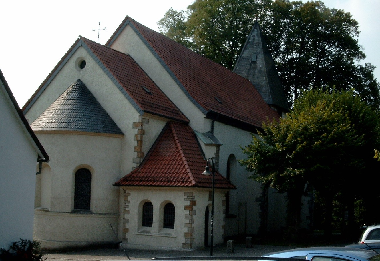 Die Kirche der evangelischen Gemeinde in 49143 Bissendorf-Holte.